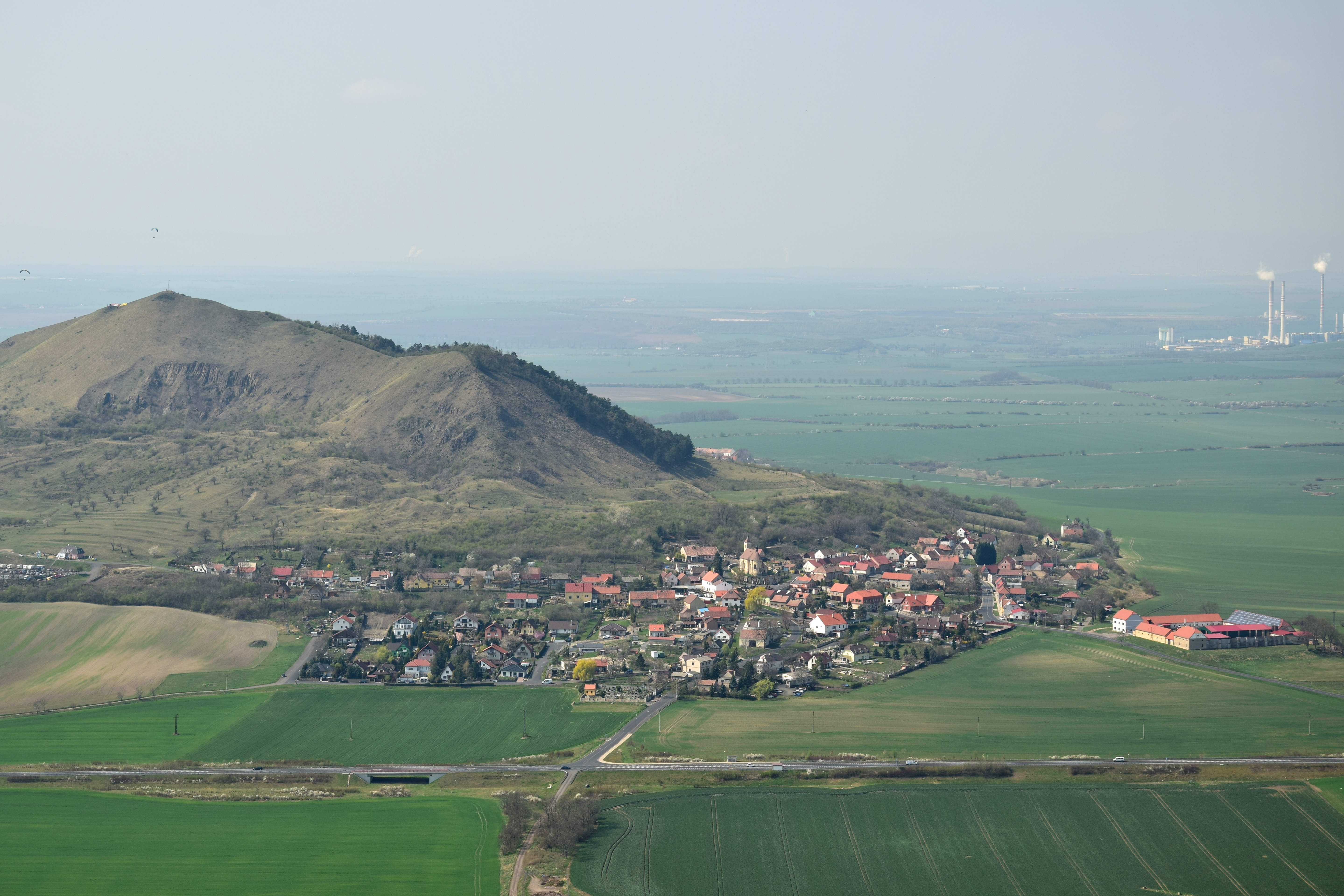 Raná – vrch a vesnice Raná z Oblíku